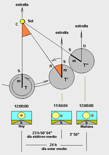 AUTHOR: Francisco Javier Blanco González COUNTRY: Reino de España -Kingdom of Spain- Tiempos sidéreo y solar medios. Made by Paint and x2y